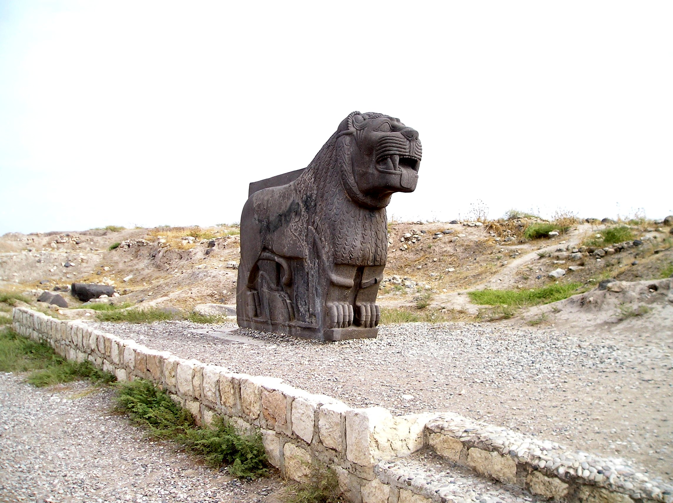 Ain Dara